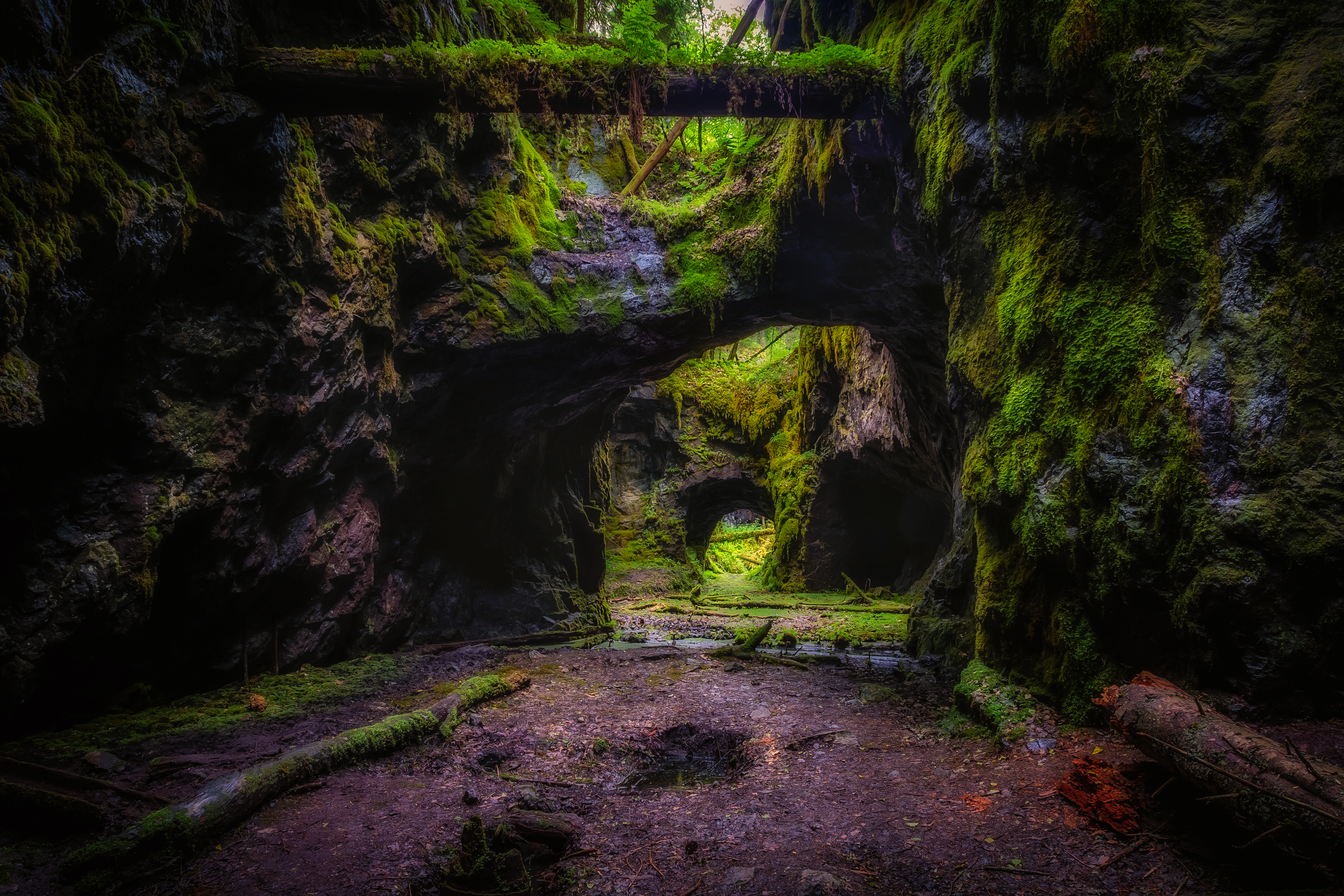 Tilas stoll is a mine shaft in Högbergsfältet.